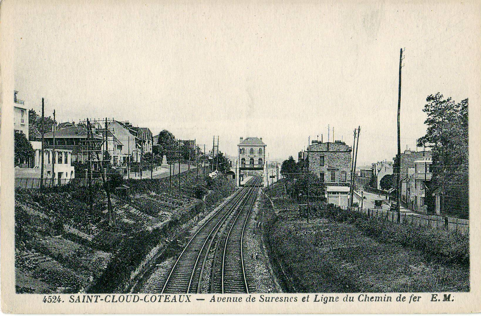 Carte postale éditée par EM N°4524SAINT-CLOUD-COTEAUX : Avenue de Suresnes et ligne du Chemin de ferIl s'agit des la Ligne des Coteaux ou des Moulineaux, devenue Ligne 2 du tramway d'Île-de-France. La ligne était à l'époque équipée du troisième rail poit la traction des rames électriques. Les gares étaient juchées au dessus des voies, sans doute pour permettre un accès aisé des voyageurs depuis les deux cotés de la ligne.